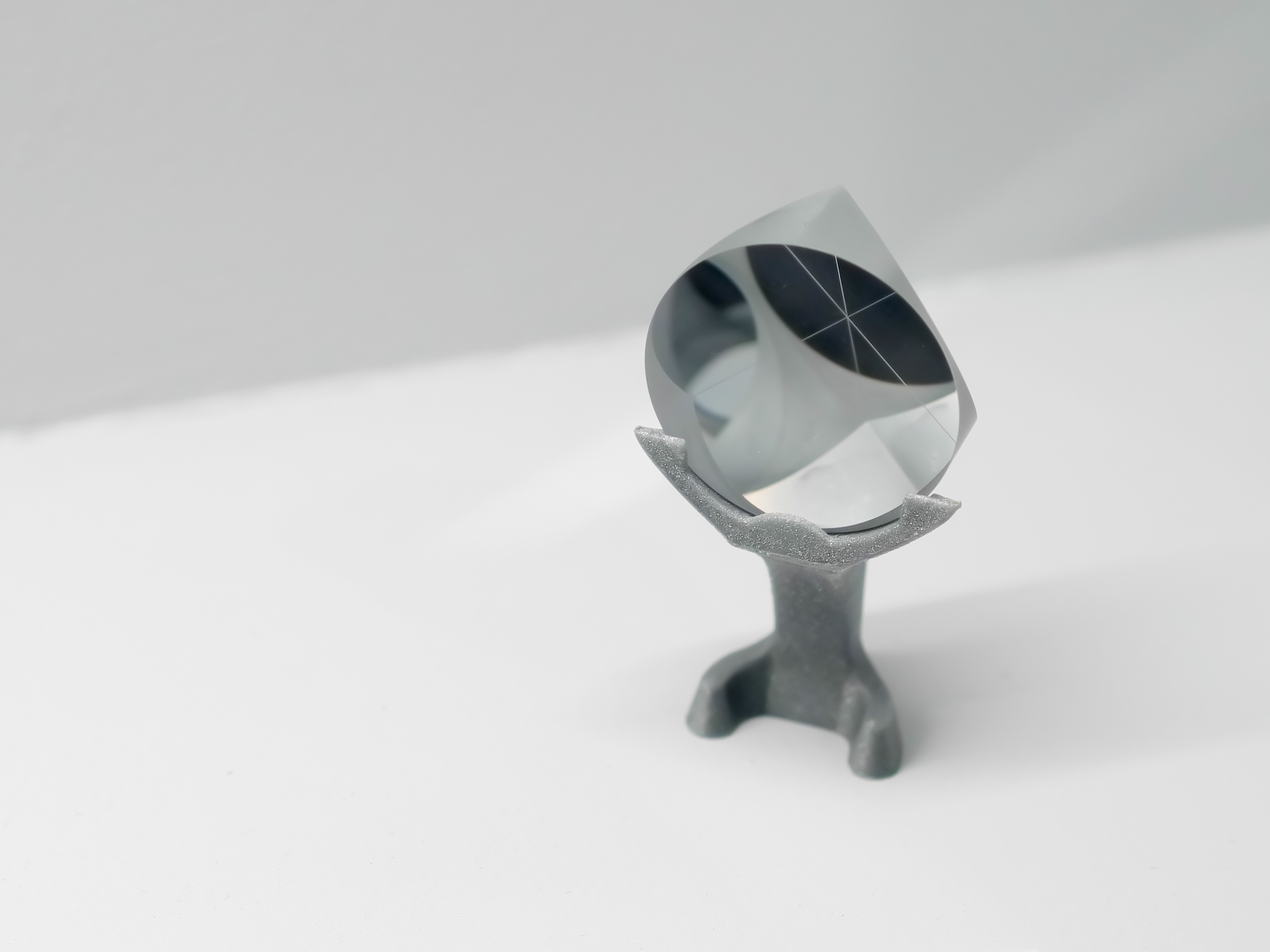 Reflexionsprisma (Carl Zeiss Jena) für die GRACE-FO-Mission (2016), GeoForschungsZentrum Potsdam